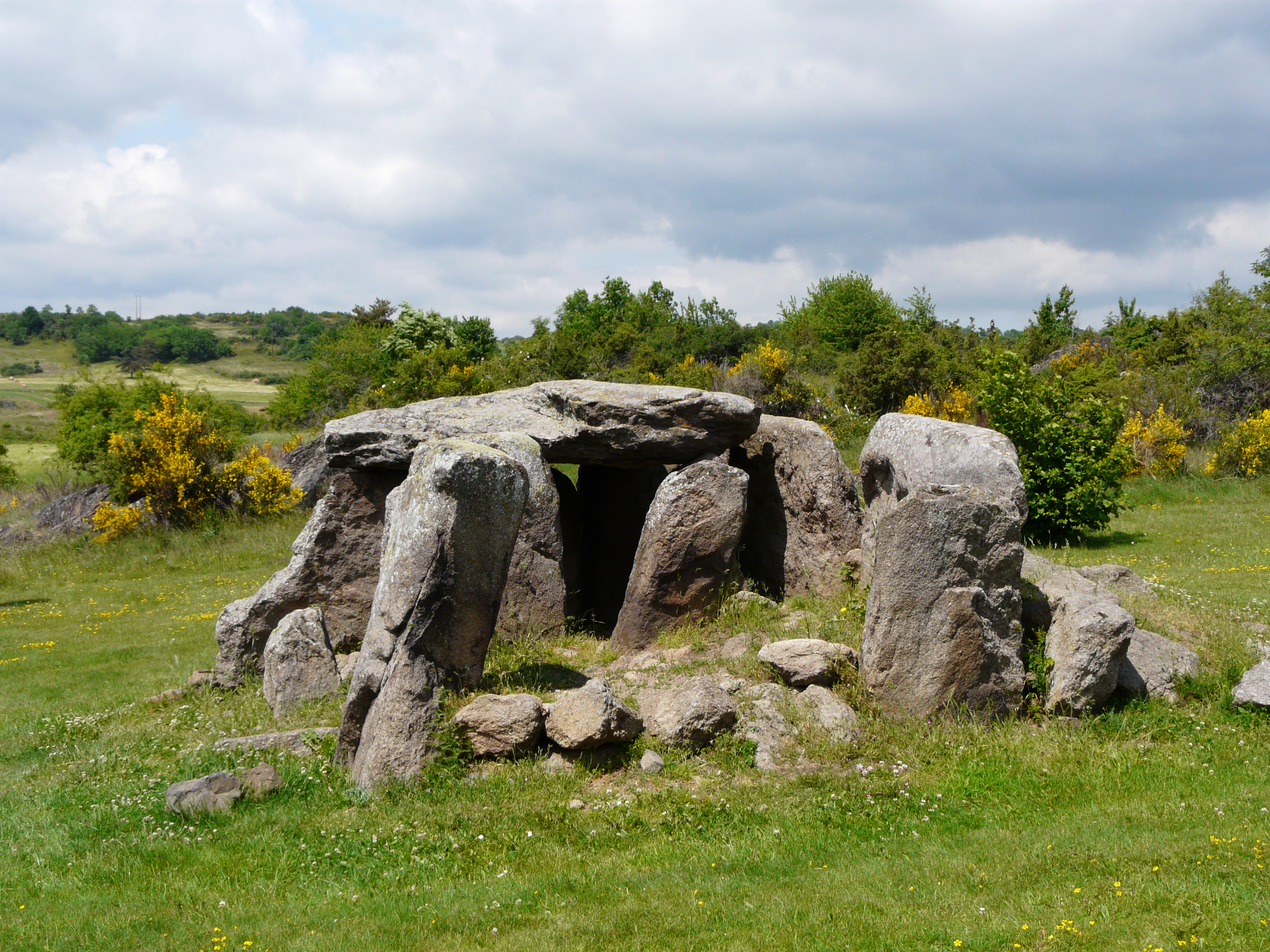 Le dolmen de la Grotta, Cournols, Puy-de-Dôme, France.